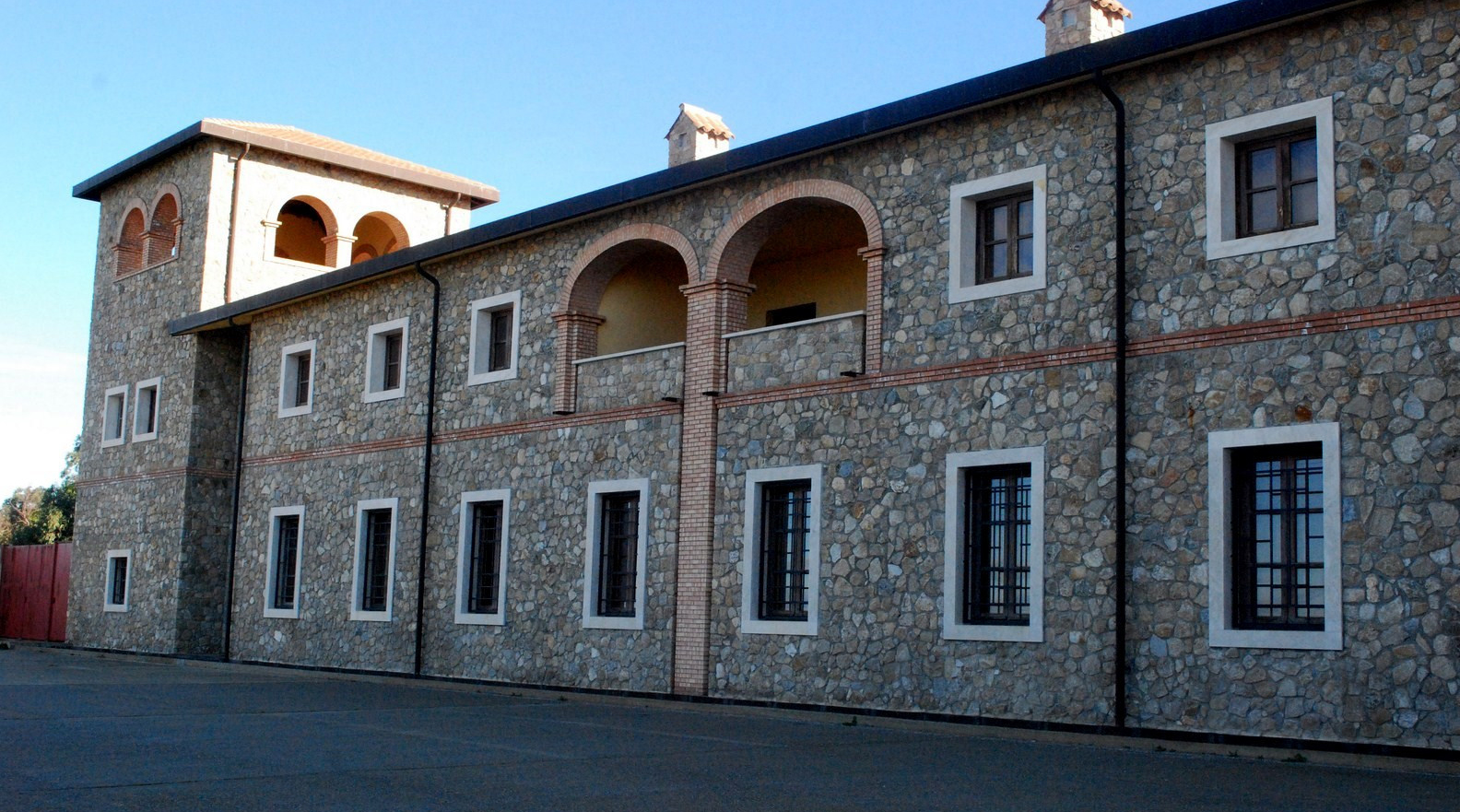 Nuovo Convento della Visitazione